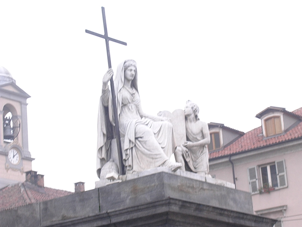 Statua rappresentante la Religione presente di fronte alla chiesa Gran Madre (Torino) Foto scattata dall'utente